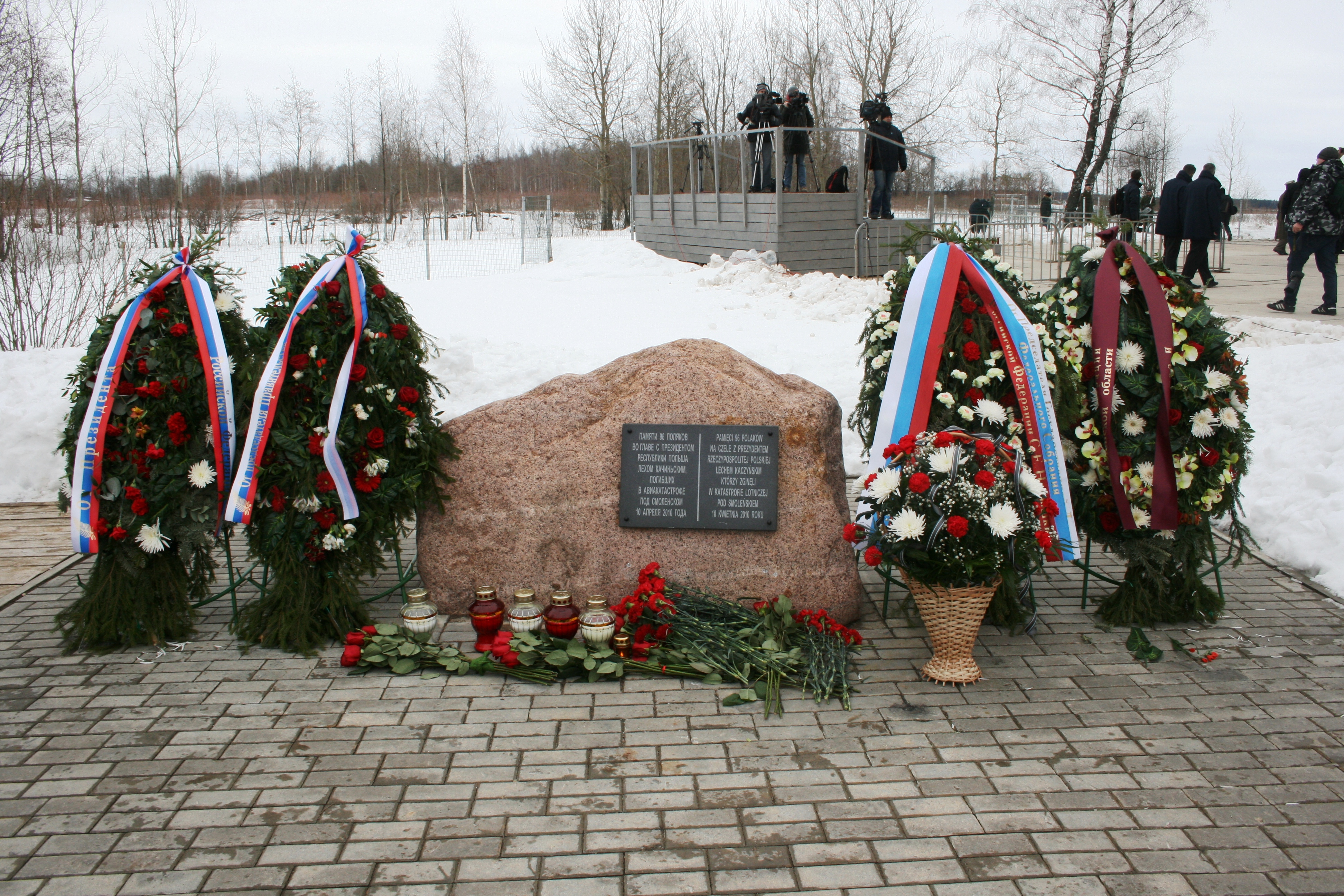 Kamień pamiątkowy poświęcony ofiarom katastrofy samolotu prezydenckiego w 2010 roku na terenie lotniska Sewiernyj w Smoleńsku